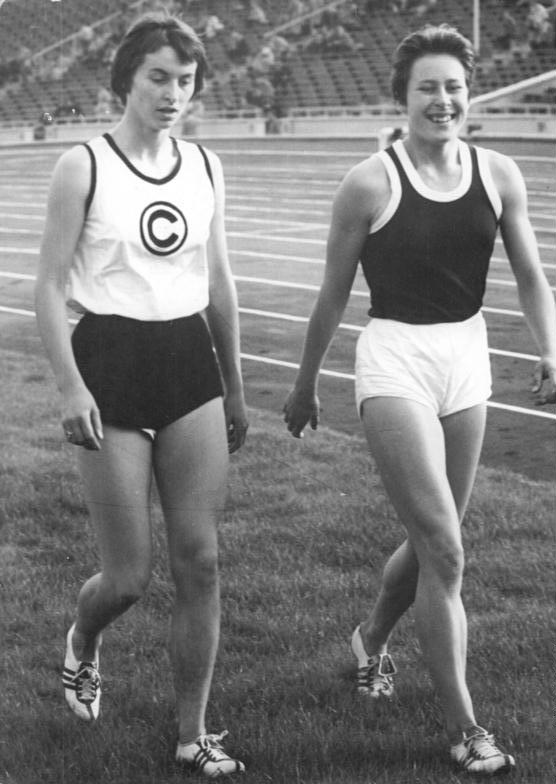 Inge Fuhrmann, Bärbel Mayer Zentralbild Wendorf 5.9.1956 Letzte Vorbereitungen für Melbourne. Am Sonnabend, dem 1.9.1956, wurden im Zentral-Stadion in Leipzig die letzten Ausscheidungsläufe für die 4x100m-Staffel der Damen durchgeführt. UBz: Auch Inge Fuhrmann (links) mußte sich davon überzeugen, daß Bärbel Mayer die bessere Schlußläuferin ist.